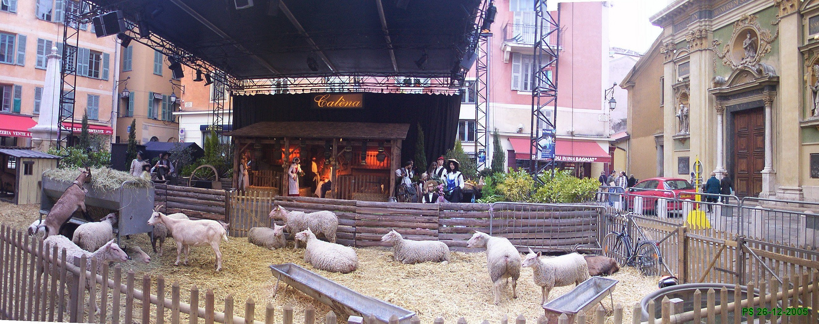 La crèche de Noel sur la place Rossetti.